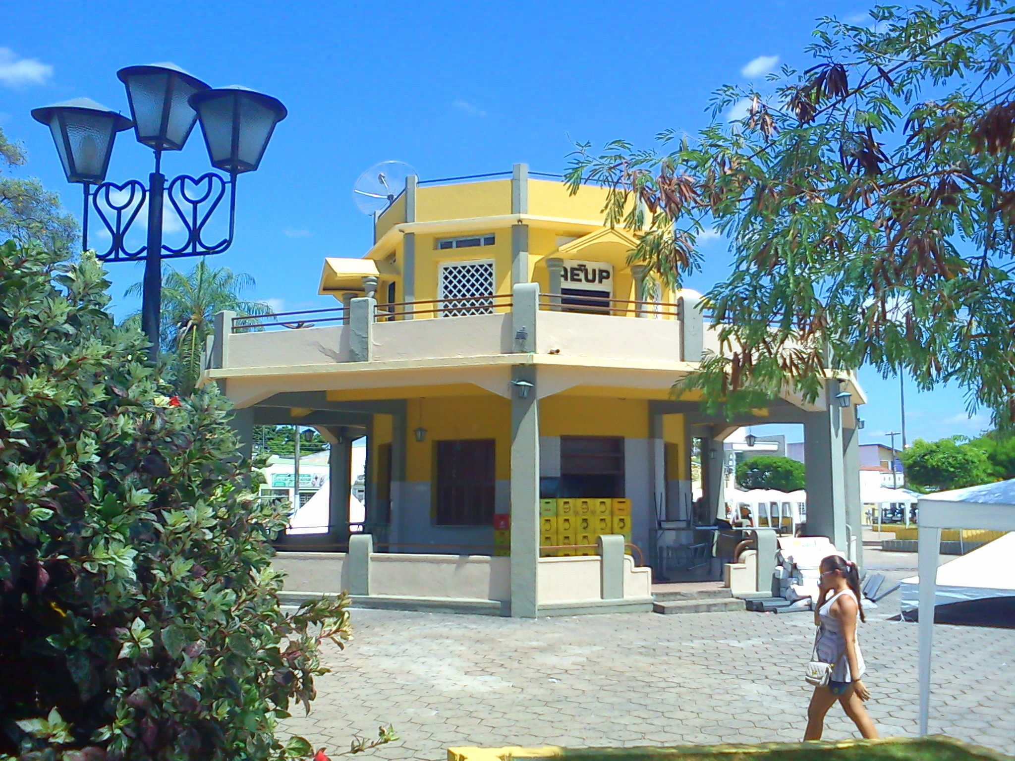 Bar Centenário e a AEUP [Associação dos Estudantes Universitários de Pombal] em 2011 reformados na cor amarela